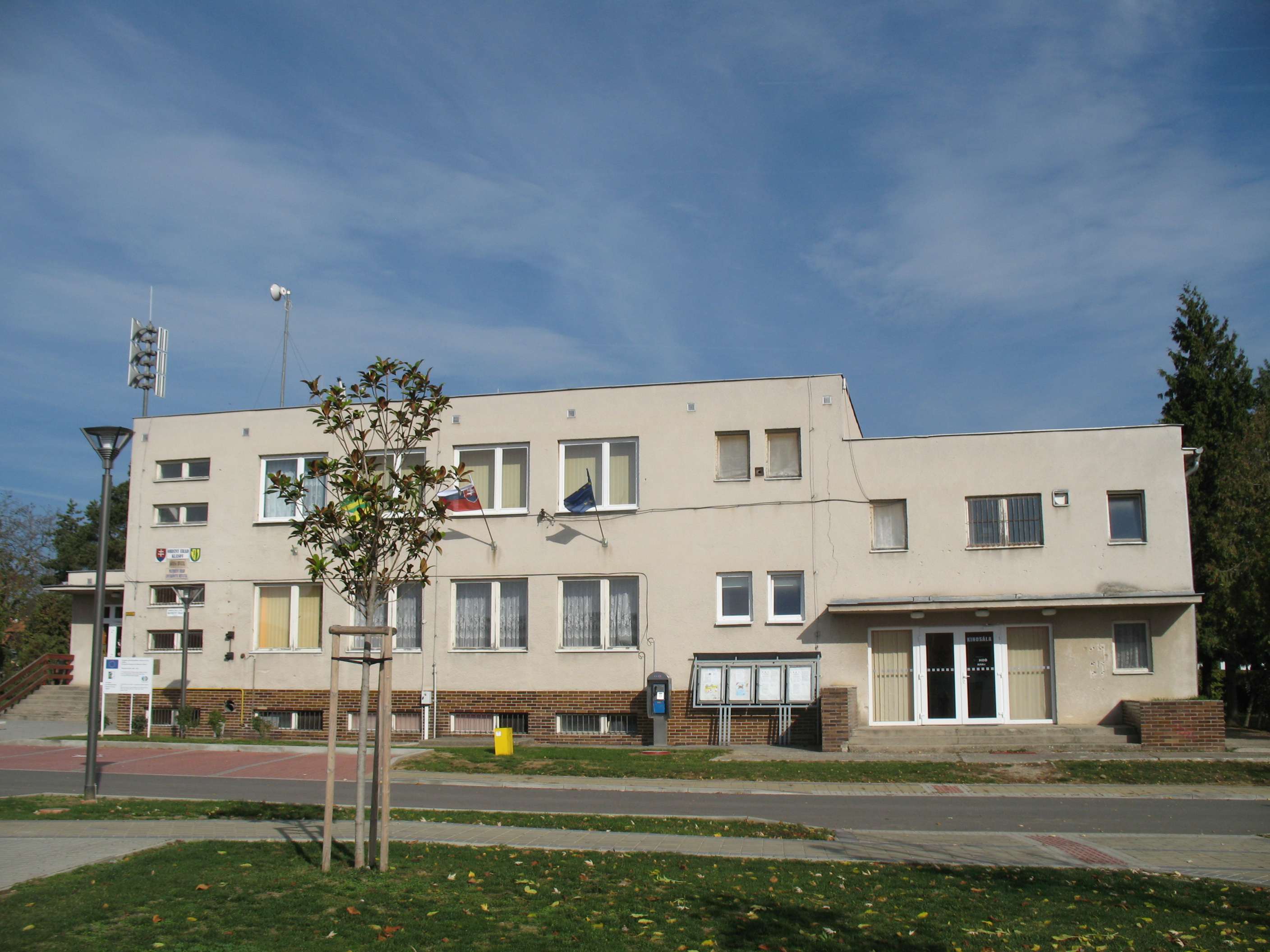 Kalász